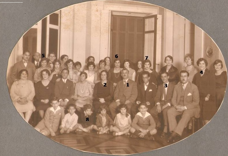 foto de membros da familia Pimentel Toledo Piza